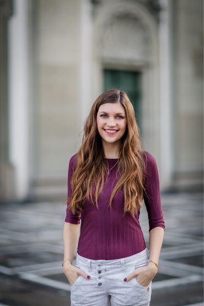 Jacqueline Straub